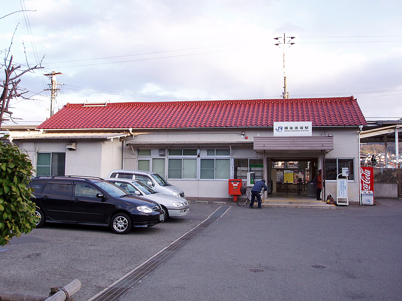 West Japan Railway Sanyo Main Line Bingo-Akasaka Station Building 西日本旅客鉄道 山陽本線 備後赤坂駅 駅建物